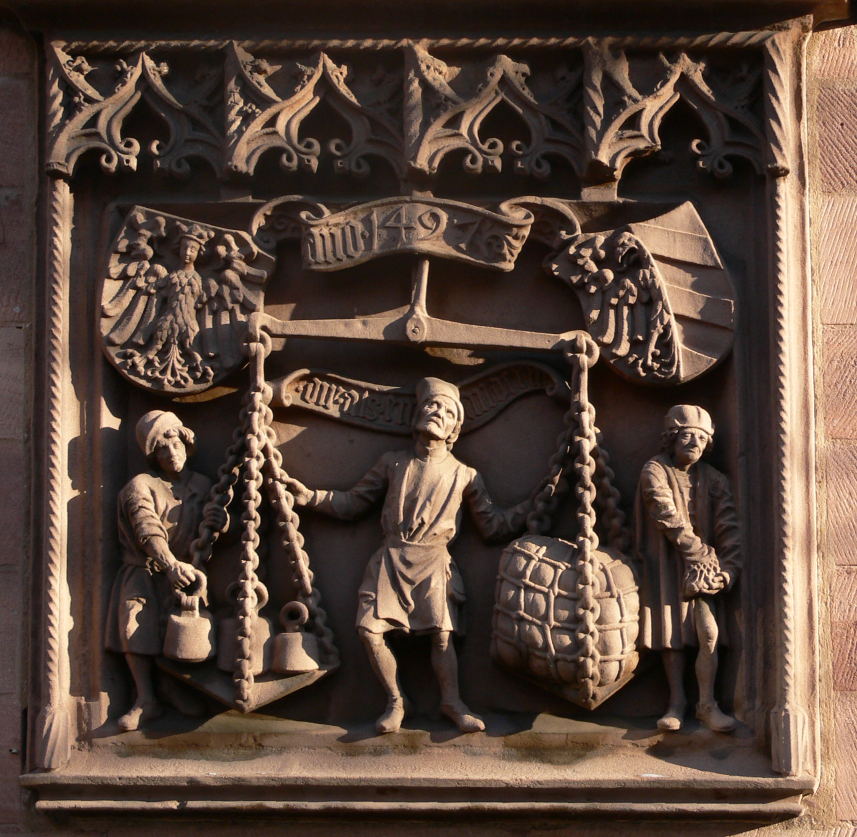 Nürnberg, Saalbau der IHK Mittelfranken, Winklerstraße 22, am Standort der im 2. Weltkrieg zerstörten "Kleinen Stadtwaage", Kopie des Hauszeichens der kleinen Stadtwaage (Original im Germanischen Nationalmuseum)